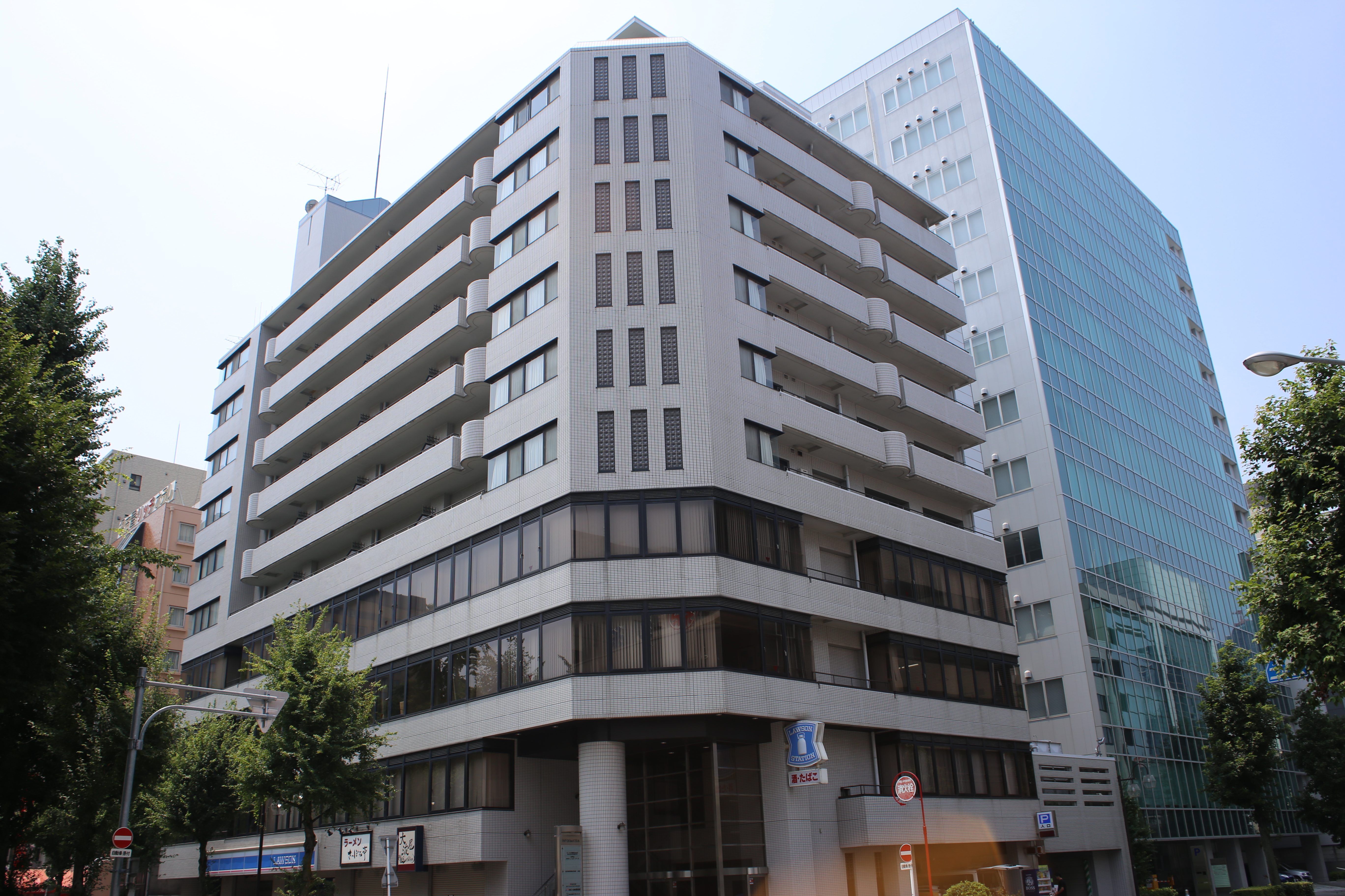 名古屋市中区錦一丁目の錦ハーモニービルを北側公道東側より撮影